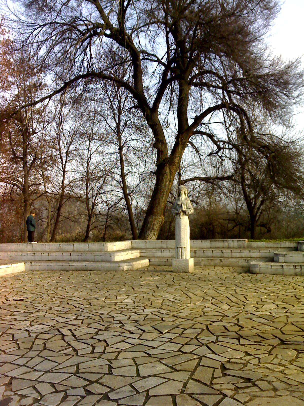 Изворът на Белоногата